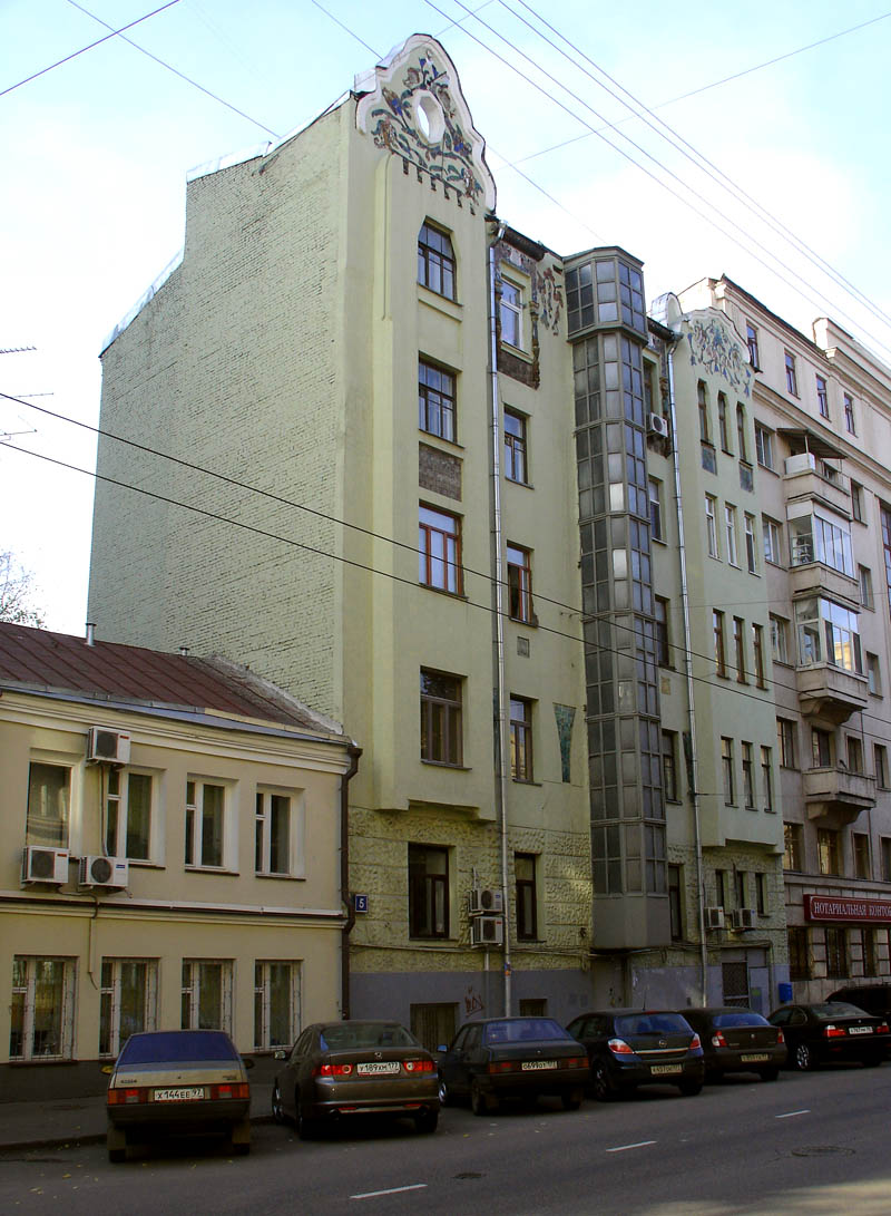 4-я Тверская-Ямская, 5. Дом постройки Эрнста Нирнзее, самая необычная его (?) работа. Шестиугольные окна - не московская деталь; кроме Нирнзее, её в Москве использовал только петербуржец Владимир Апышков Building by Ernst Nirnsee, Moscow, 4-th Tverskaya-Yamskaya Street. Hexagonal windows are very unusual for Moscow architecture (there are two buildings with them, the other by Vladimir Apyshkov).